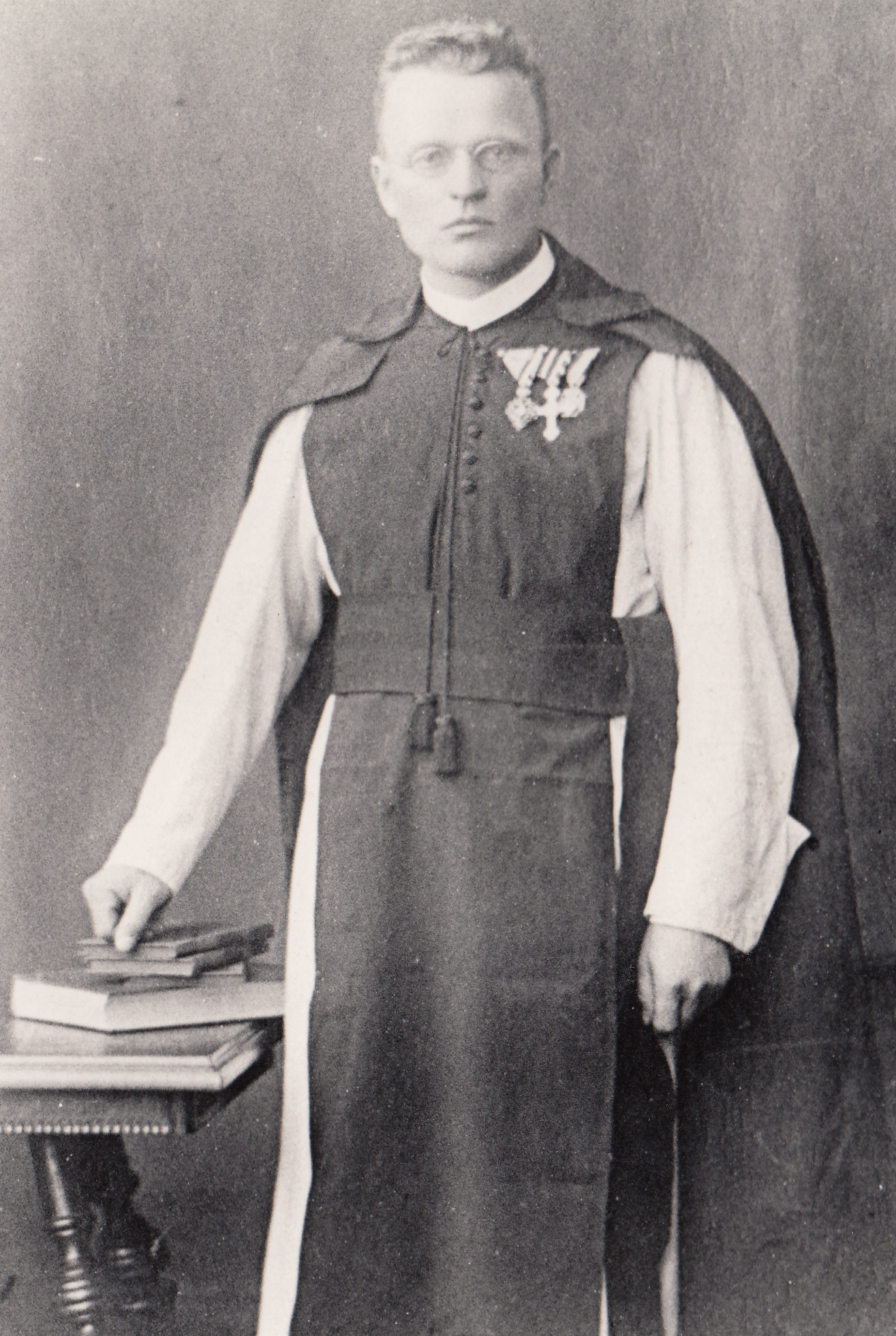 Alberich Rabensteiner, Zisterzienser der Abtei Heiligenkreuz; Prior und Administrator in Wr. Neustadt-Neukloster